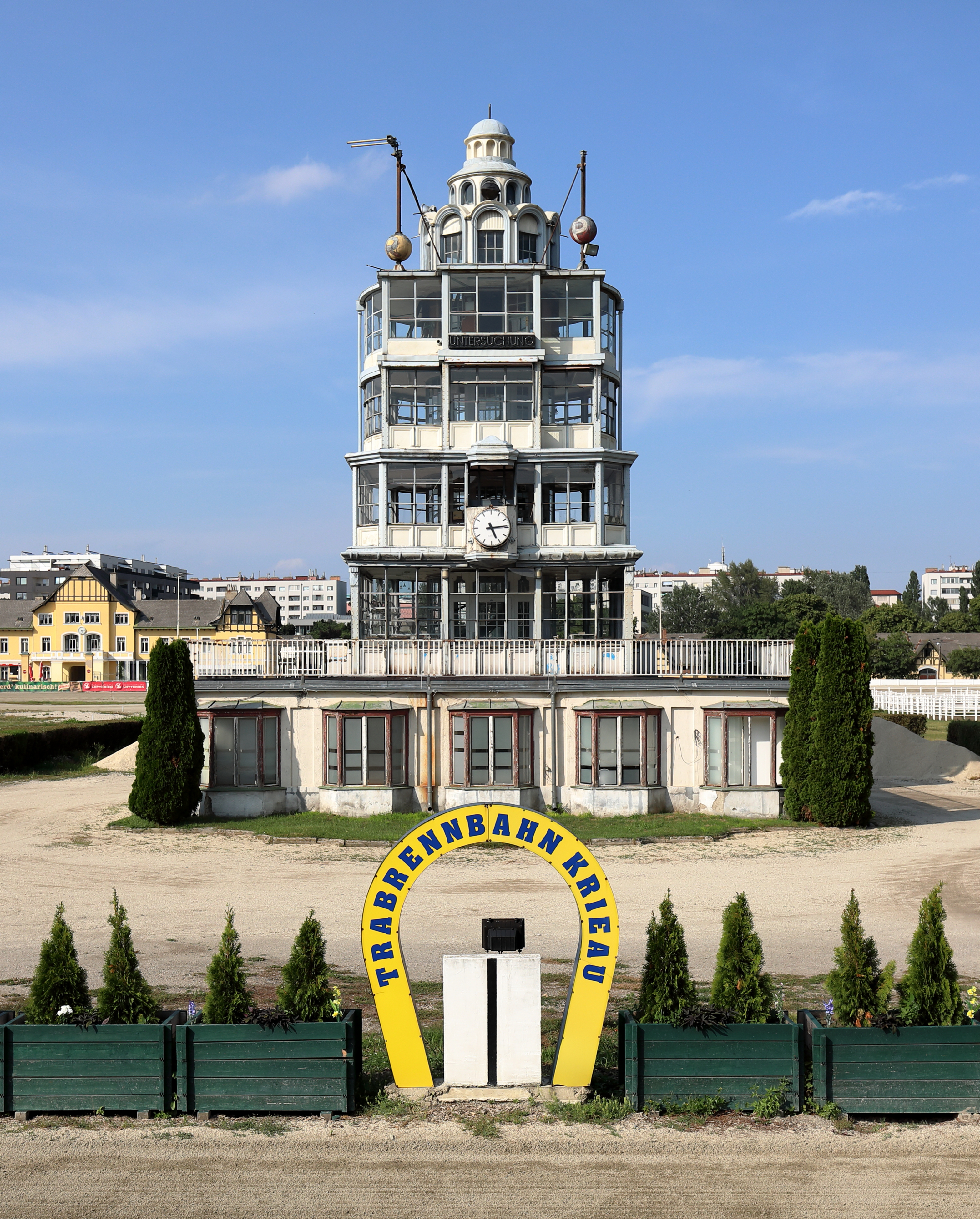 Der Zielrichterturm der Trabrennbahn Krieau im 2. Wiener Bezirk Leopoldstadt Der Trabrennplatz in der Krieau, ein Teil des Praters, wurde am 29. September 1878 eröffnet. Nachdem die ursprüngliche hölzerne Tribünenanlage in die Jahre gekommen war, wurde sie von 1912 bis 1913 durch die Architektengemeinschaft Emil Hoppe, Marcel Kammerer und Otto Schönthal erneuert. Der Zielrichterturm als letzter Bauteil wurde erst nach dem Ersten Weltkrieg im Jahr 1919 errichtet.